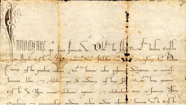 Concessioni papali agli abitanti di Aspra